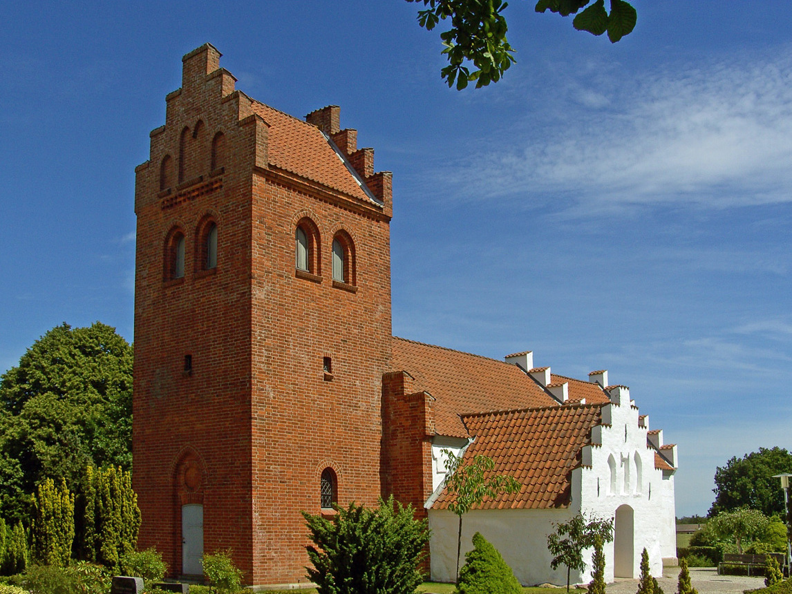 fra sydvest